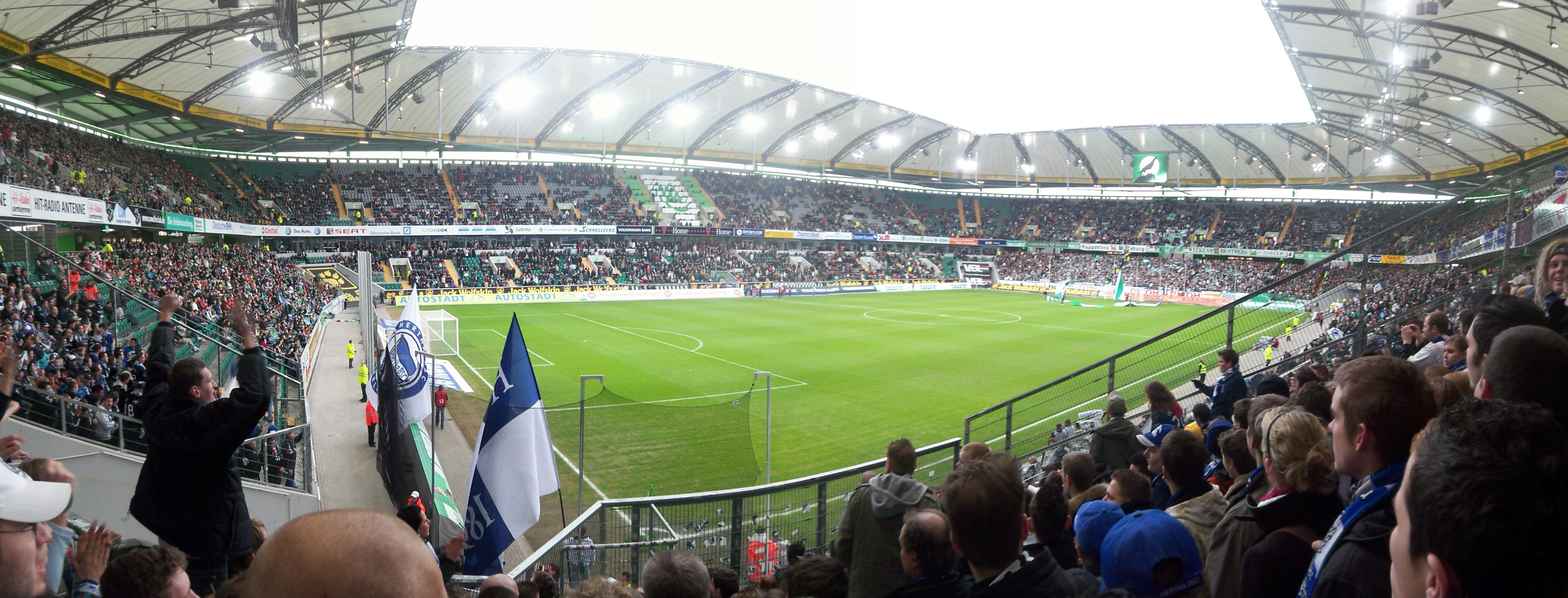 Spiel VfL Wolfsburg - Hertha BSC am 23.02.2008